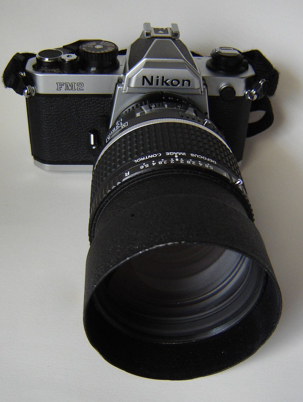 Nikon FM2n w/Nikkor 135mm f/2 DC